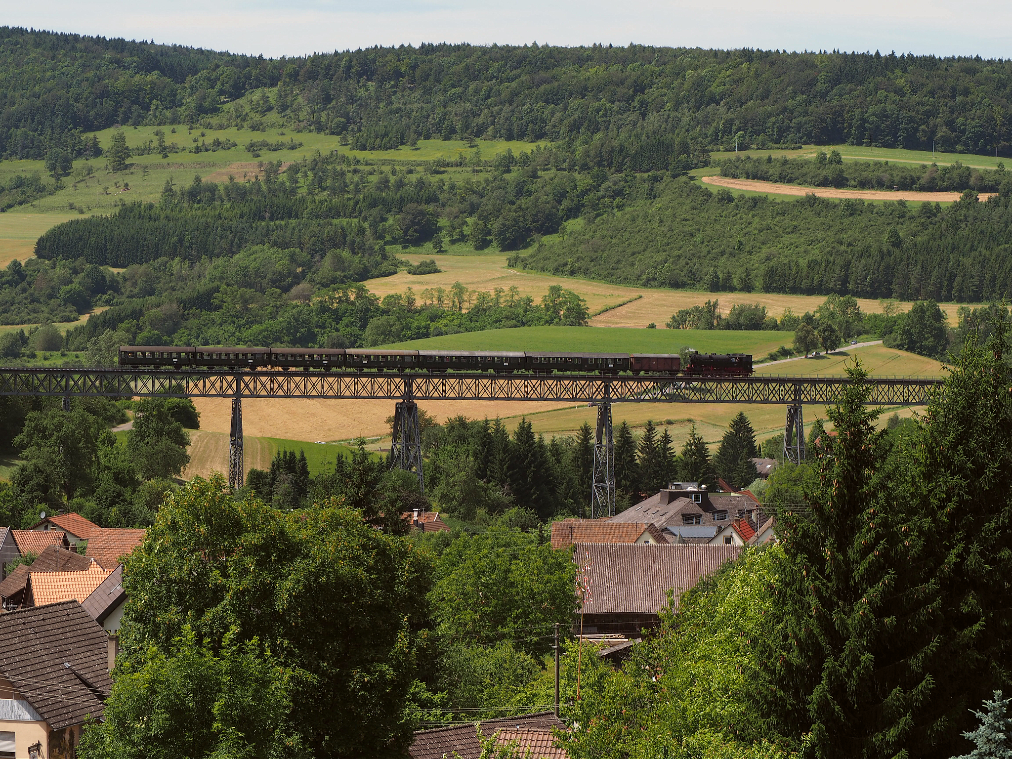 Lok 262 crossing the Epfenhofner Viadukt,Sauschwanzlebahn .